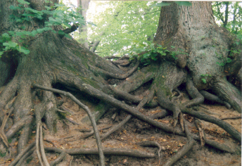 Boomstronken; foto door Fruggo, juni 2003.